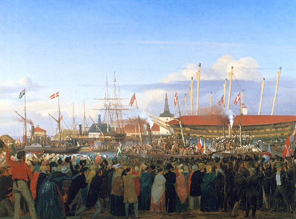 Höhepunkt des Studenten-Skandinavismus: Ankunft von Studenten aus Schweden und Norwegen zum Studententreffen in Kopenhagen 1845